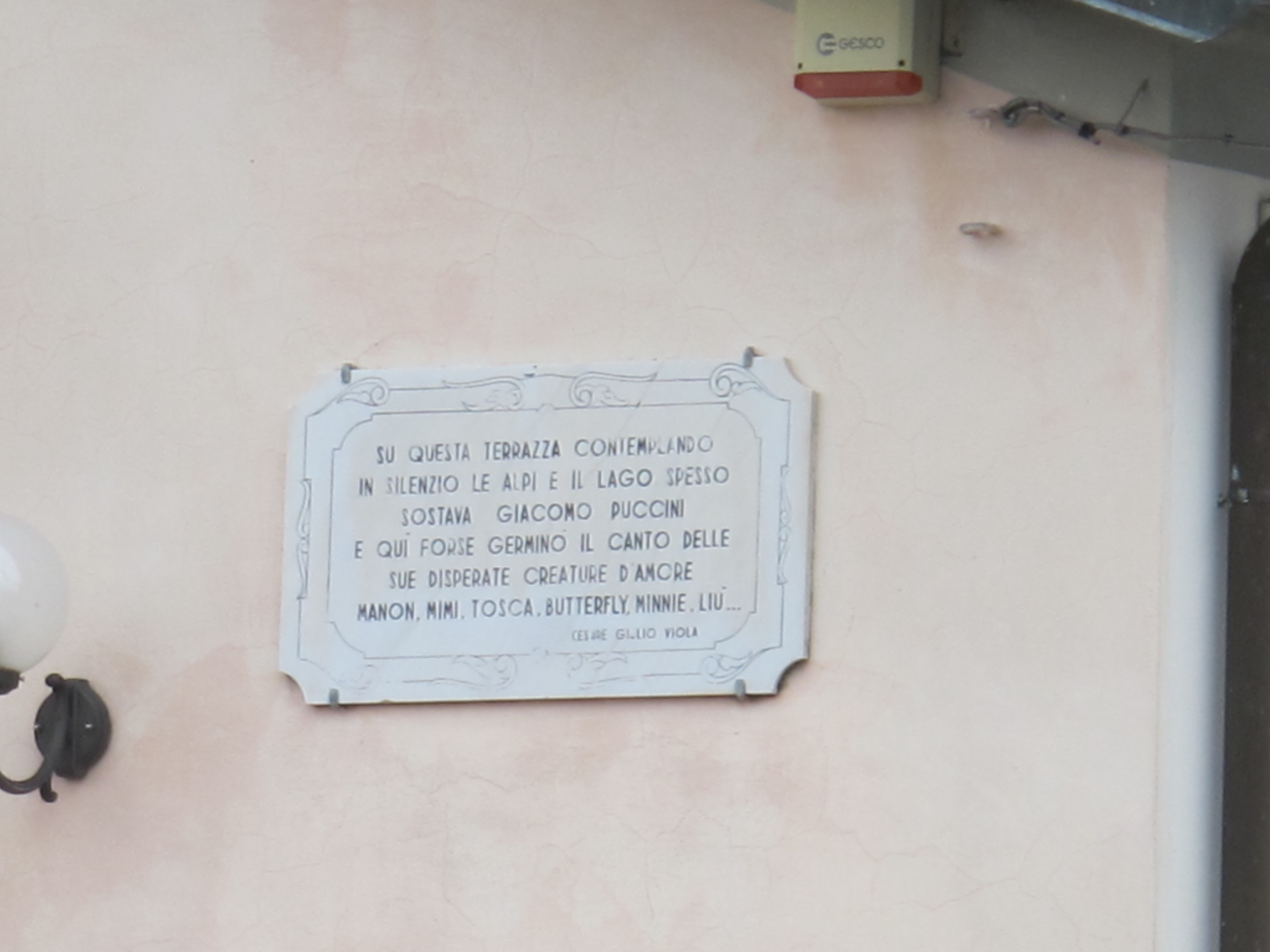 Torre del lago, targa puccini